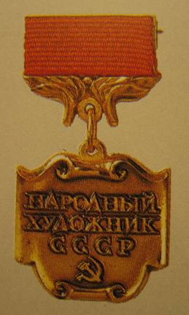 Знак «Народный художник СССР»